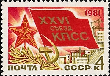 Почтовая марка СССР. XXVI съезд КПСС. Значок делегата съезда. Номер в каталоге ЦФА 5151